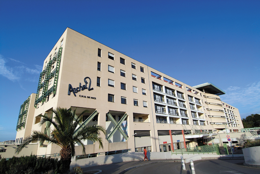 CHU-Archet